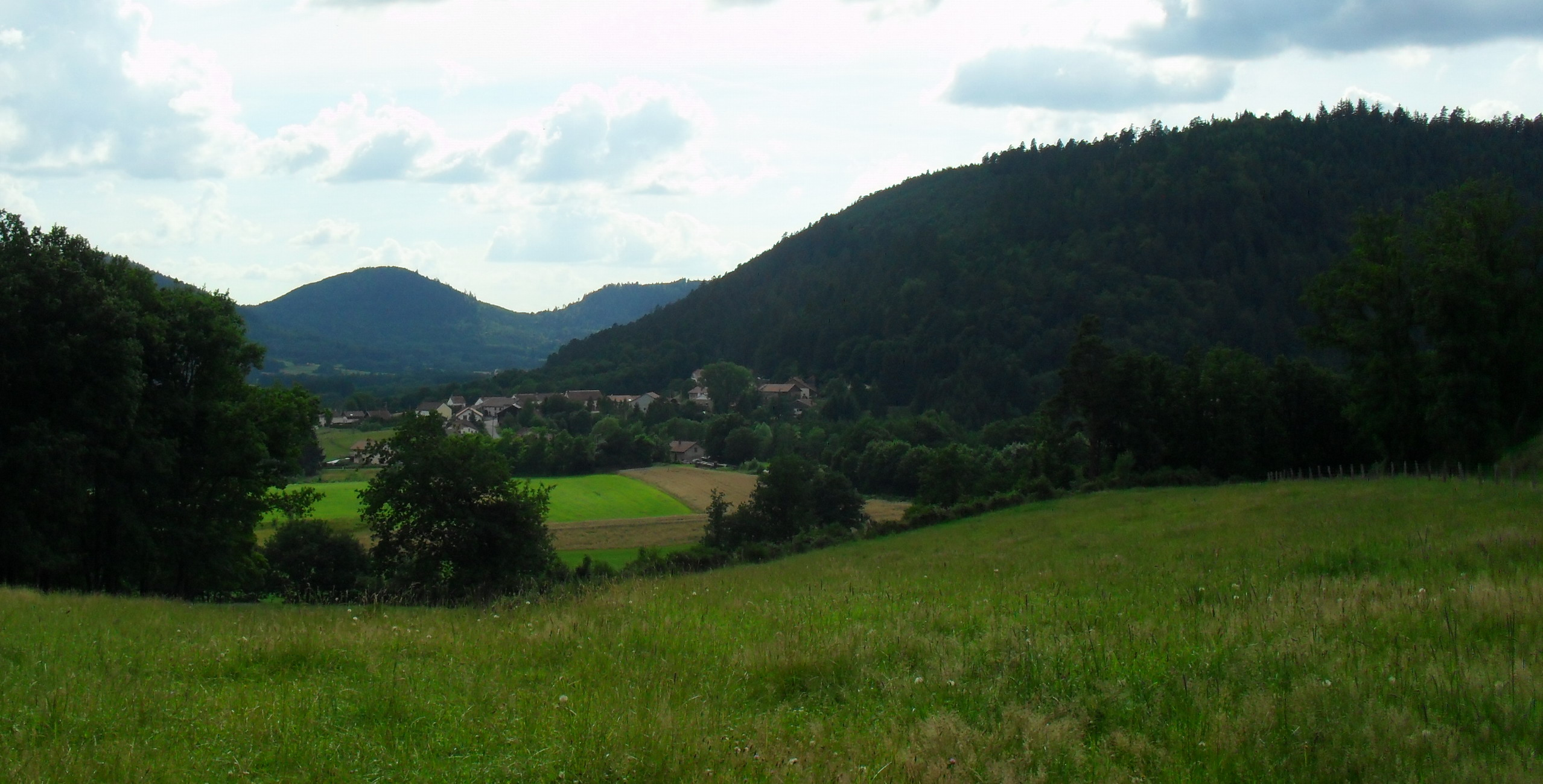 Vue vers l'ouest du hameau de Vanémont (Vosges) depuis la colline nommée "Haut de la Côte" .